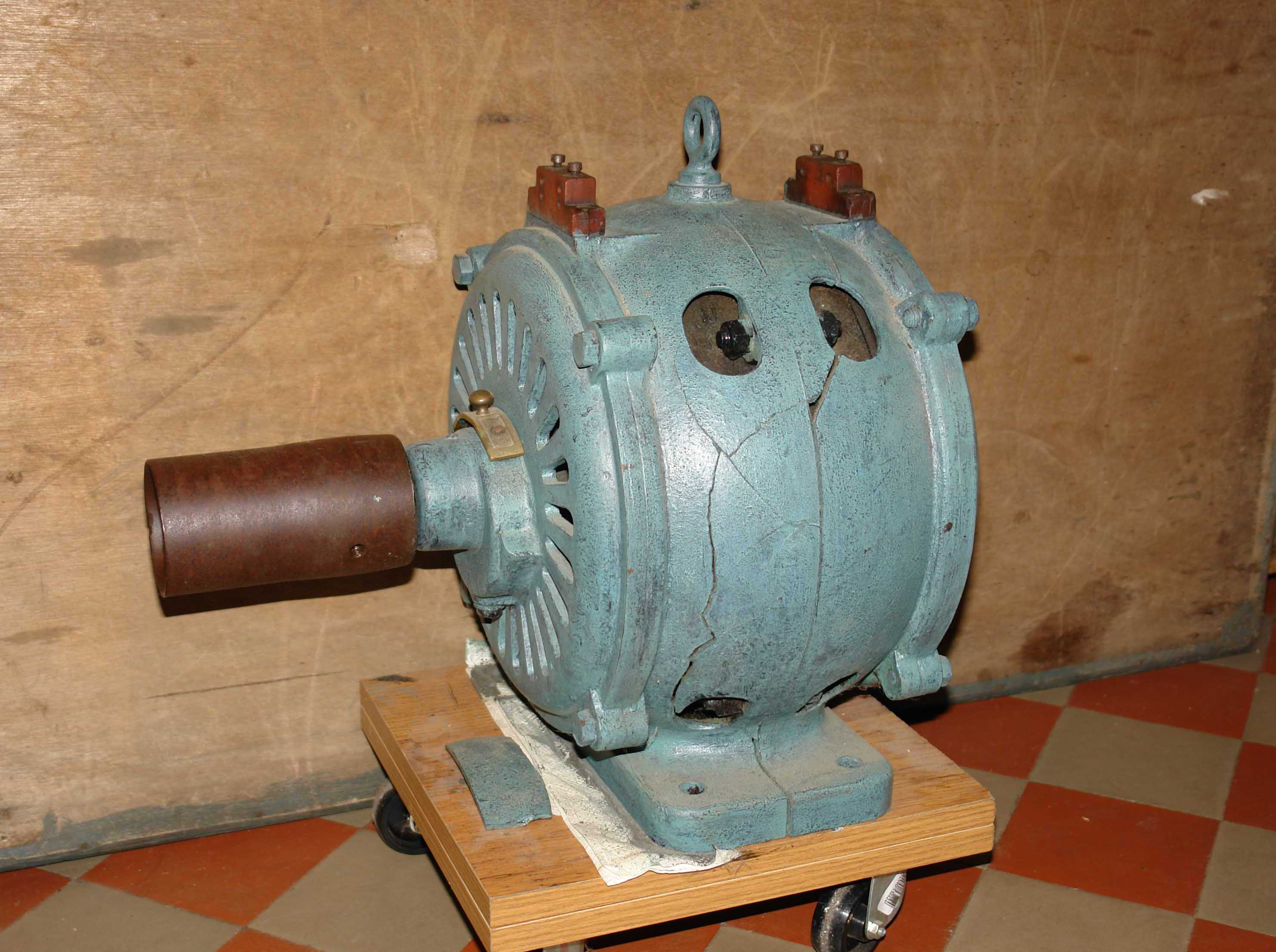 Moteur à induction, diphasé, fabriqué par R. Alioth et Cie, numéro 1042,Type M4. daté vers 1891. Le circuit du rotor de ce moteur est l'ancêtre de la cage d'écureuil. Il est constitué d'un fil en cuivre épais branché en court-circuit, totalement isolé en double couche coton sur toute sa longueur et de surcroit gainé d'un autre isolant dans les encoches qui sont légèrement inclinées. Voir les photos de l'intérieur du moteur dans la catégorie wikimedia commons Société d'électricité Alioth pour plus de précisions techniques.